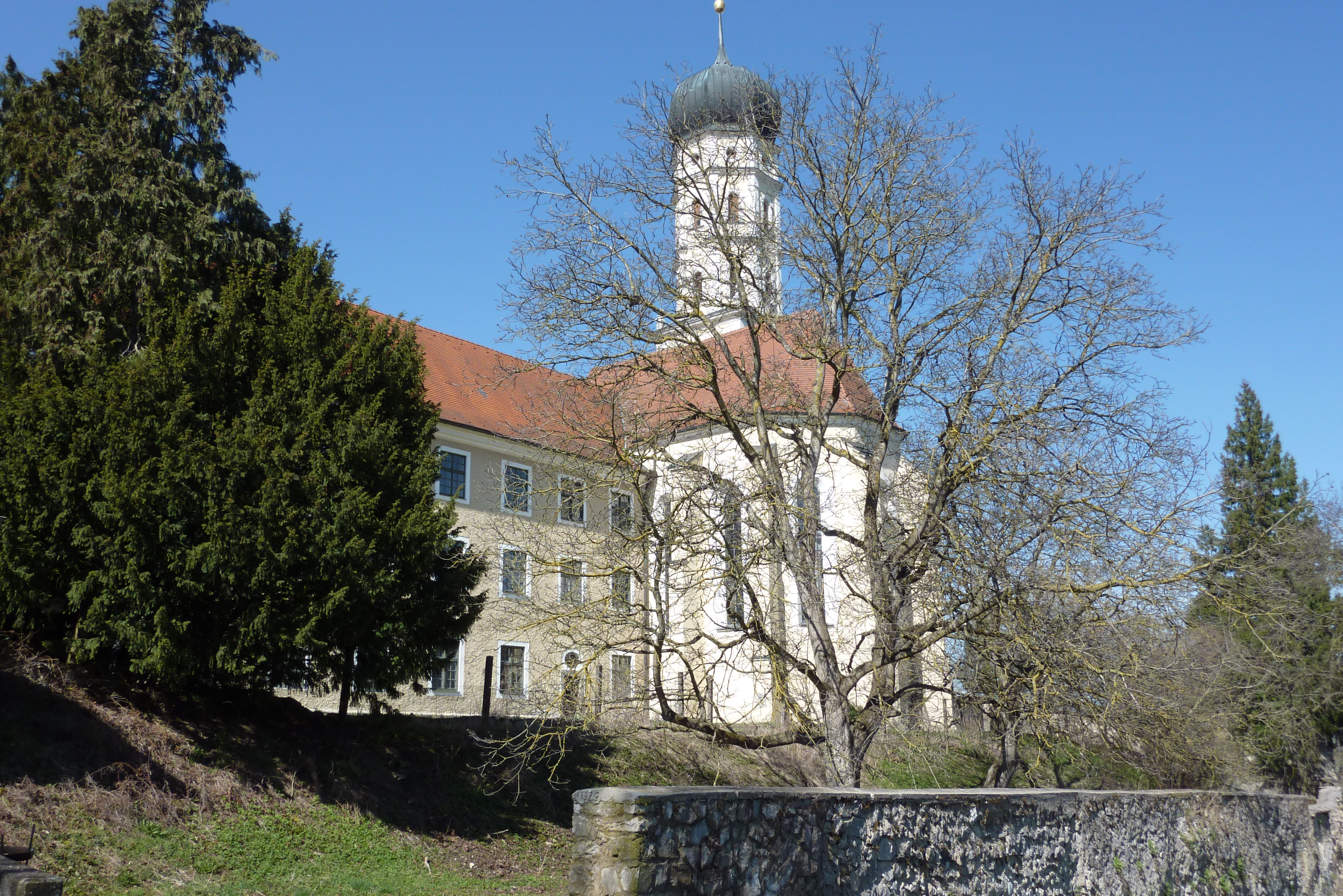 Kloster Mönchsdeggingen